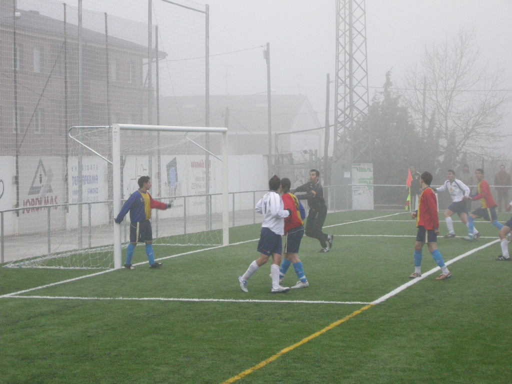 Partit del F.C. Andorra